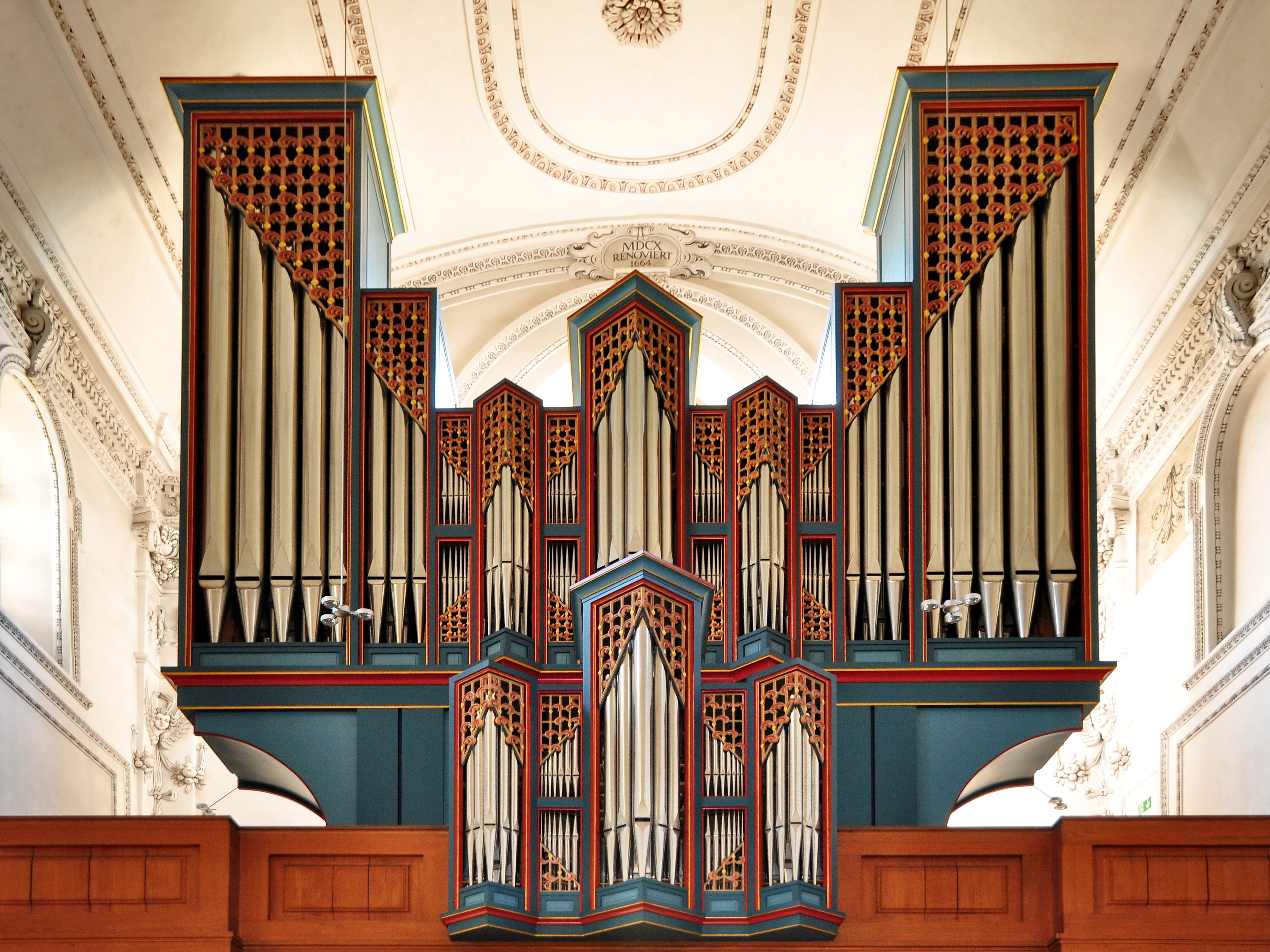 Predigerkirche in Zürich (Switzerland)